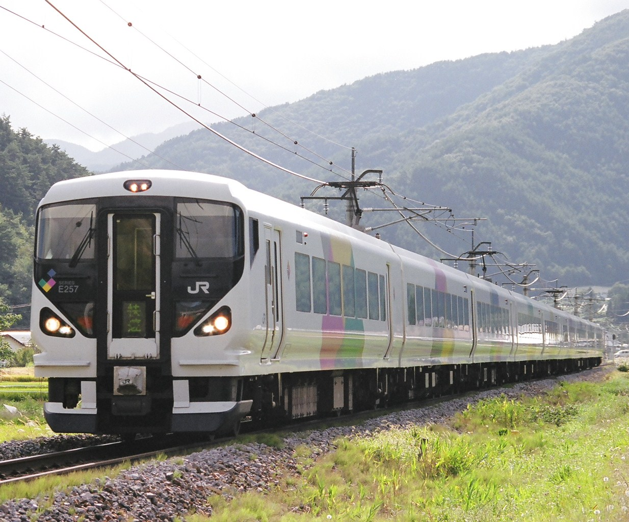 E257系による長野～松本間の快速列車